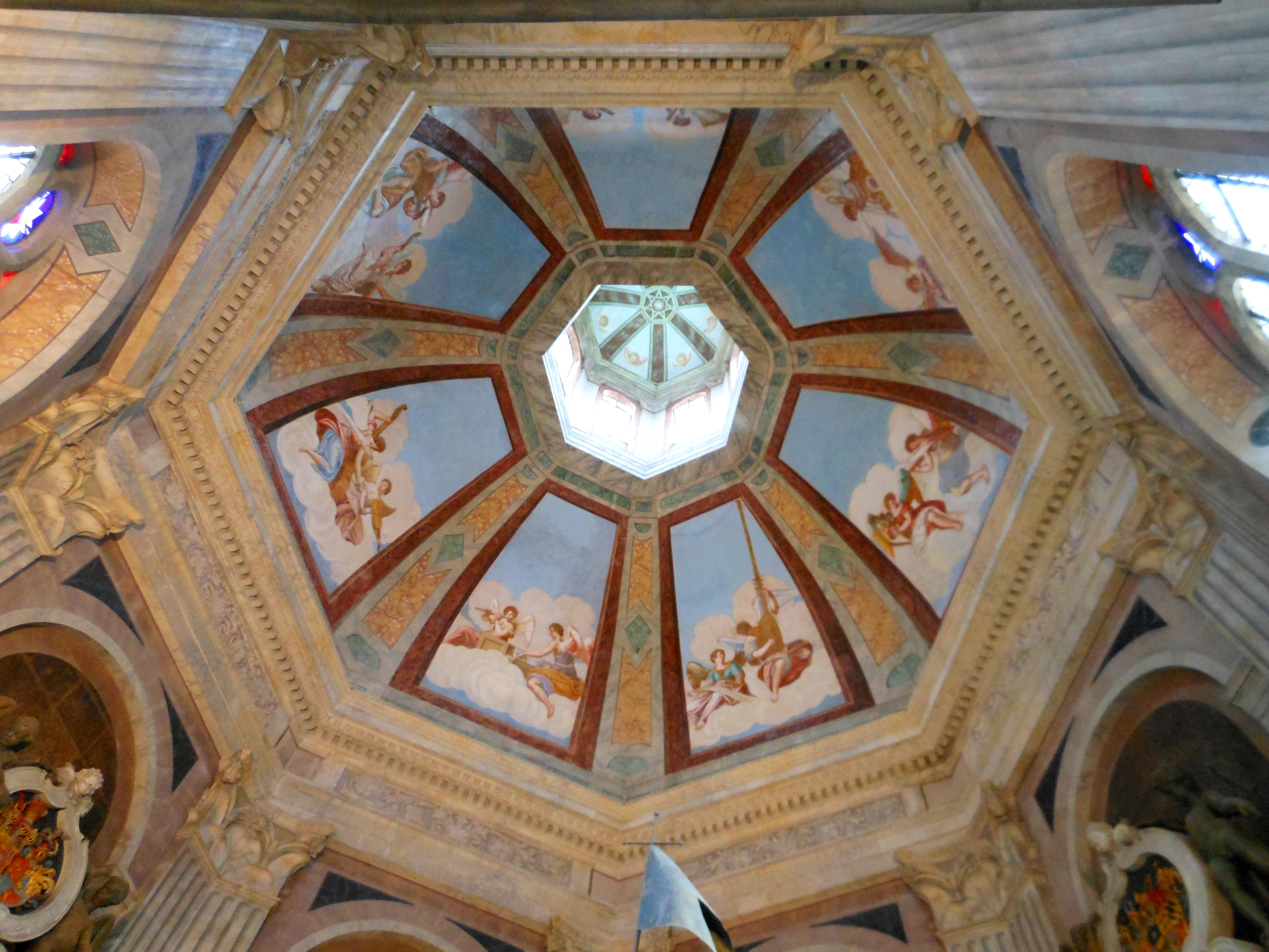 Stadthagen, Fürstenmausoleum, Blick in die Kuppel